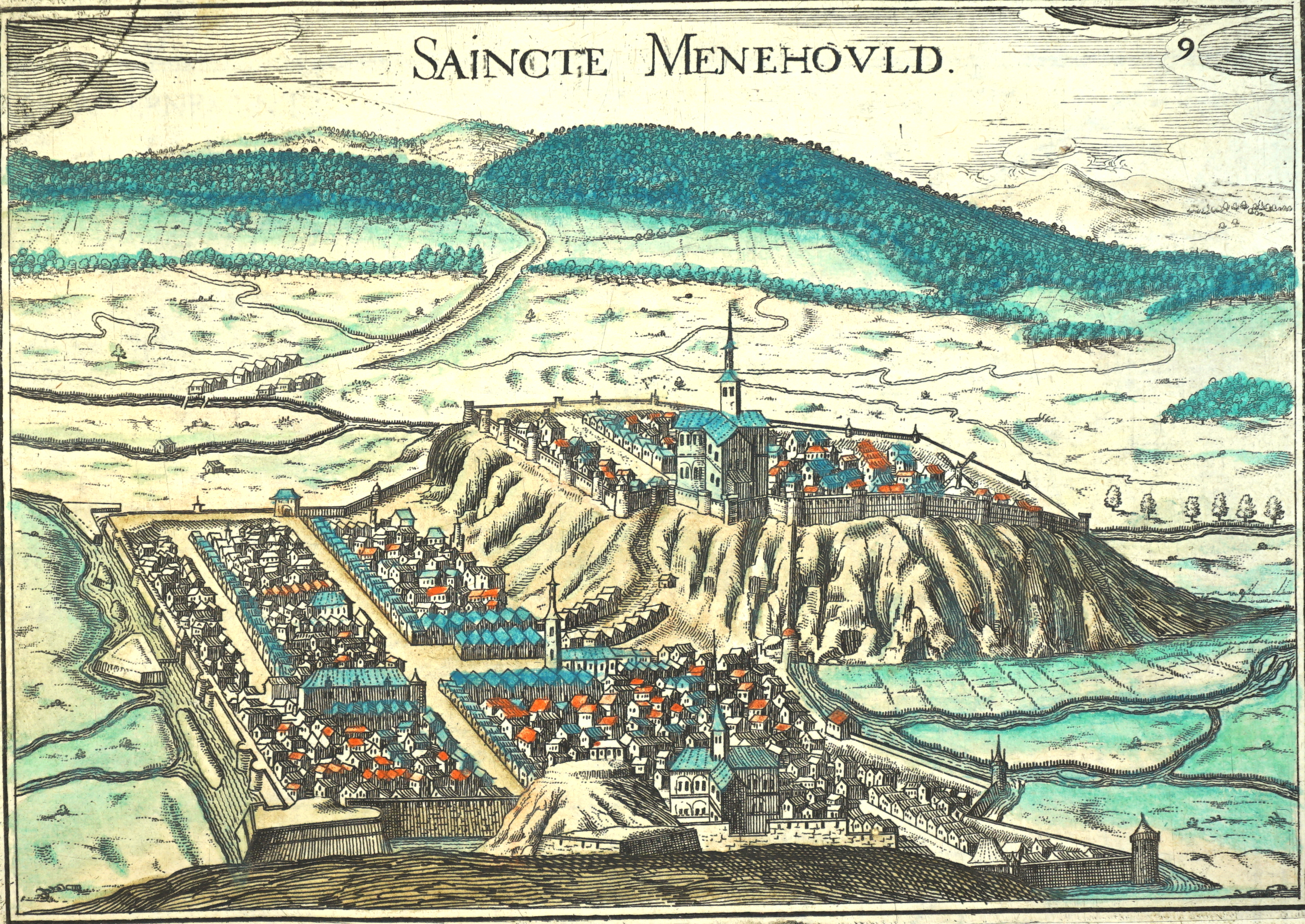 dessin provenant de plans et profils de toutes les principales villes et lieux considérables de France de C. Tassin.